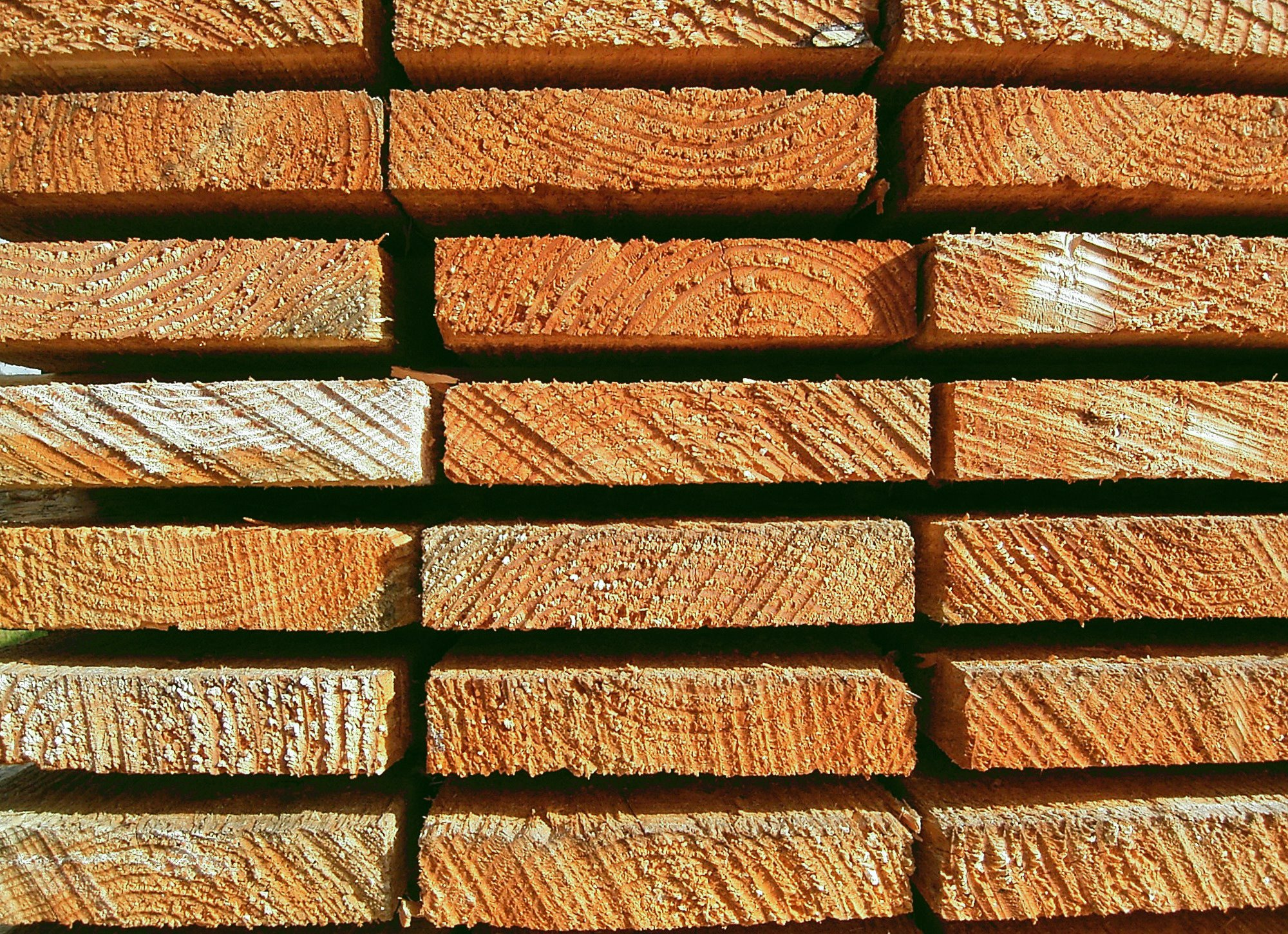 Wooden boards